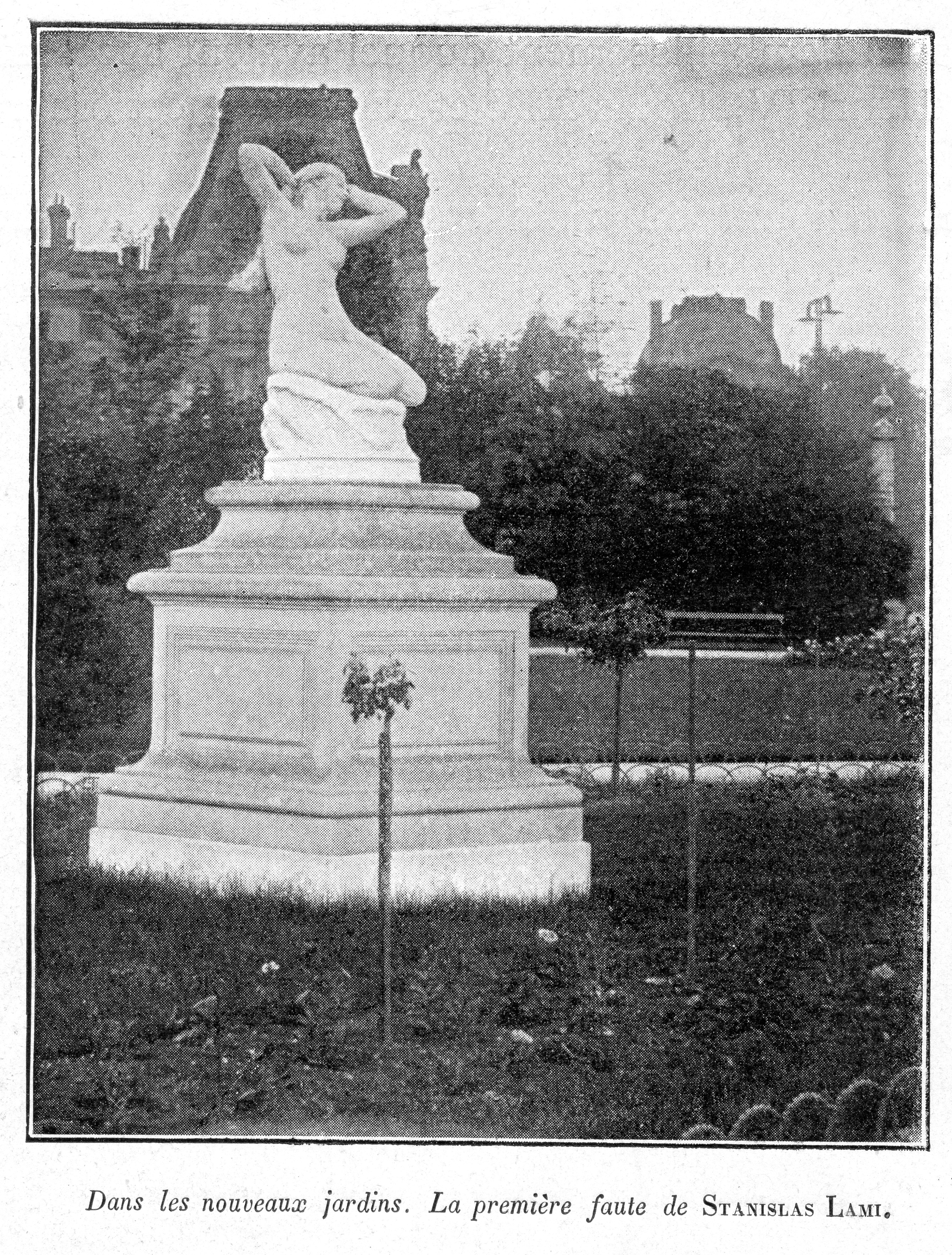 Clément Maurice Paris en plein air, BUC, 1897,Dans les nouveaux jardins, La première faute de STANISLAS LAMI